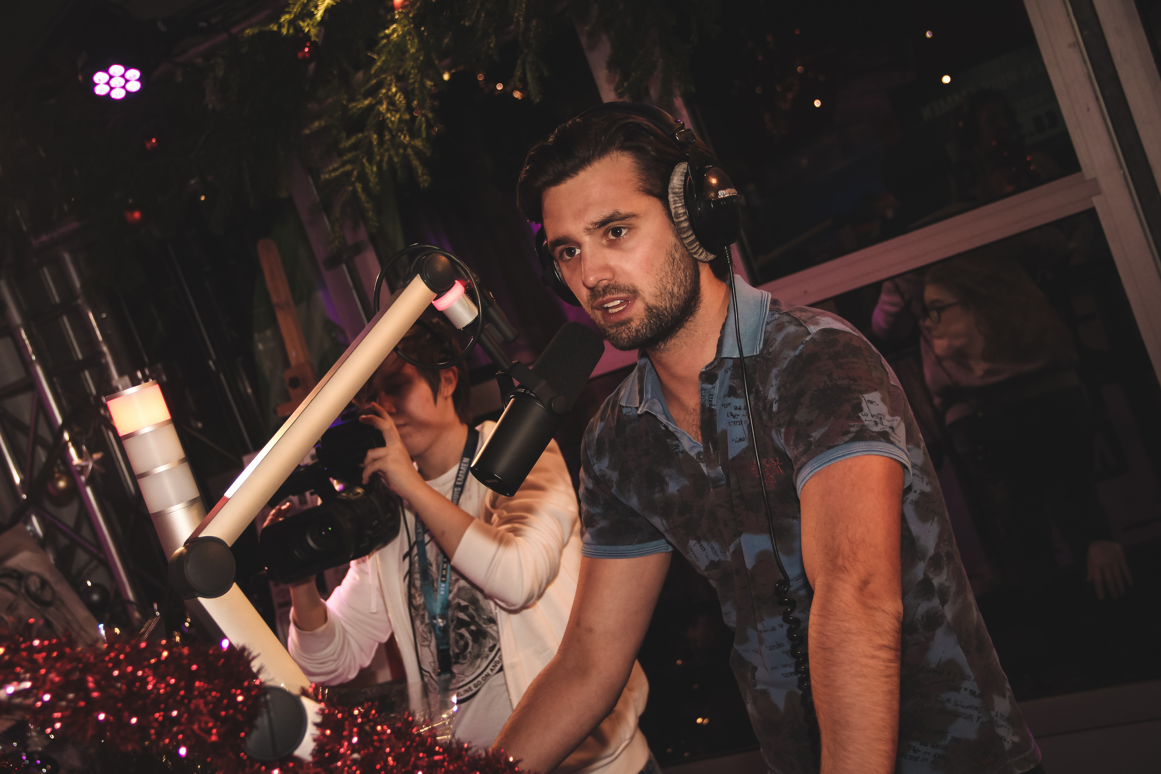 Ruud Feltkamp tijdens het Glazen Huis Emmen 2015